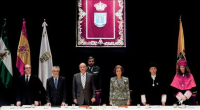 En octubre de 2010 la Universidad de Cádiz acogió por primera vez el acto oficial de apertura del curso universitario en España, con presencia de SSMM los Reyes de España, del Ministro de Educación, Ángel Gabilondo, y del Presidente de la Junta de Andalucía, José Antonio Griñán.